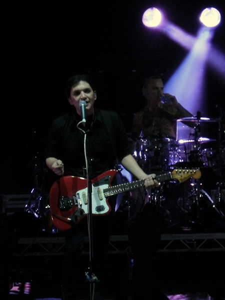 20 сентября 2012